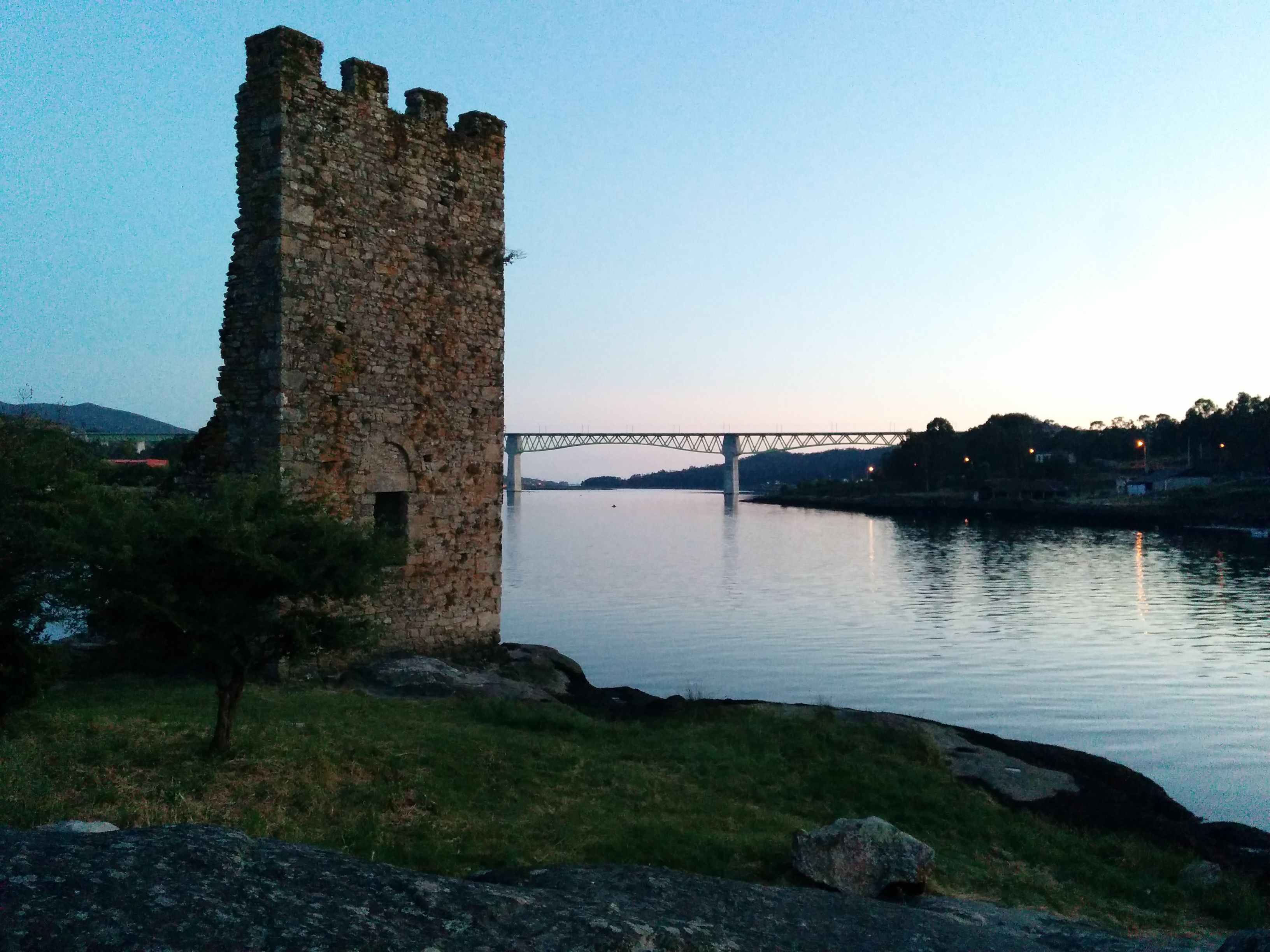 Torres de Oeste na desembocadura do río Ulla, ca ponte do tren de alta velocidade ó fondo. O río pertence ó Lugar de Importancia Comunitaria Sistema fluvial Ulla - Deza. This is a photography of a Site of Community Importance in Spain with the ID: ES1140001. Natura2000 entry, EEA entry